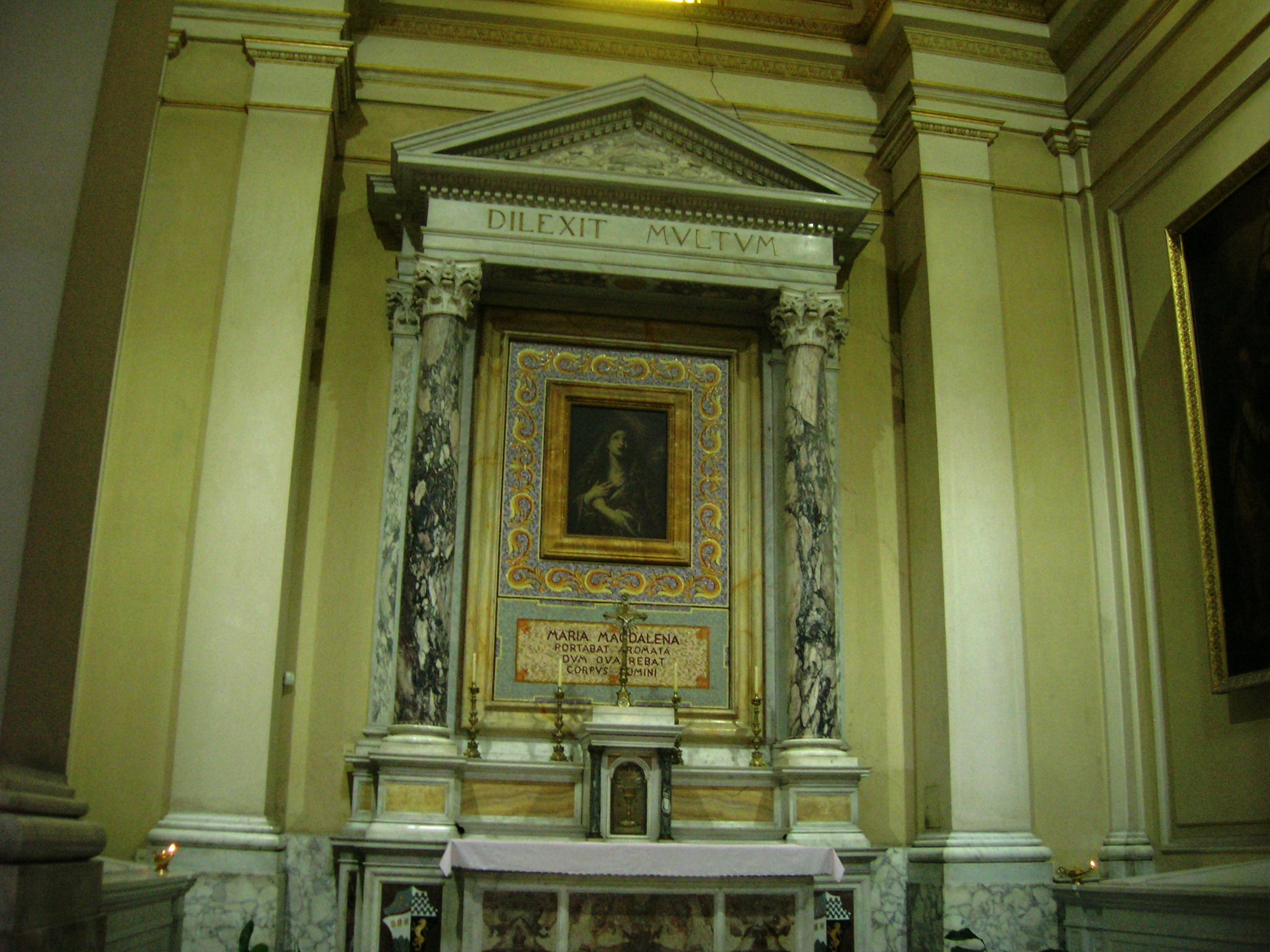 Basilica dell'Incoronata Madre del Buon Consiglio